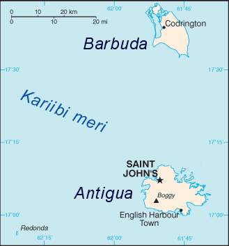 Antigua ja Barbuda kaart